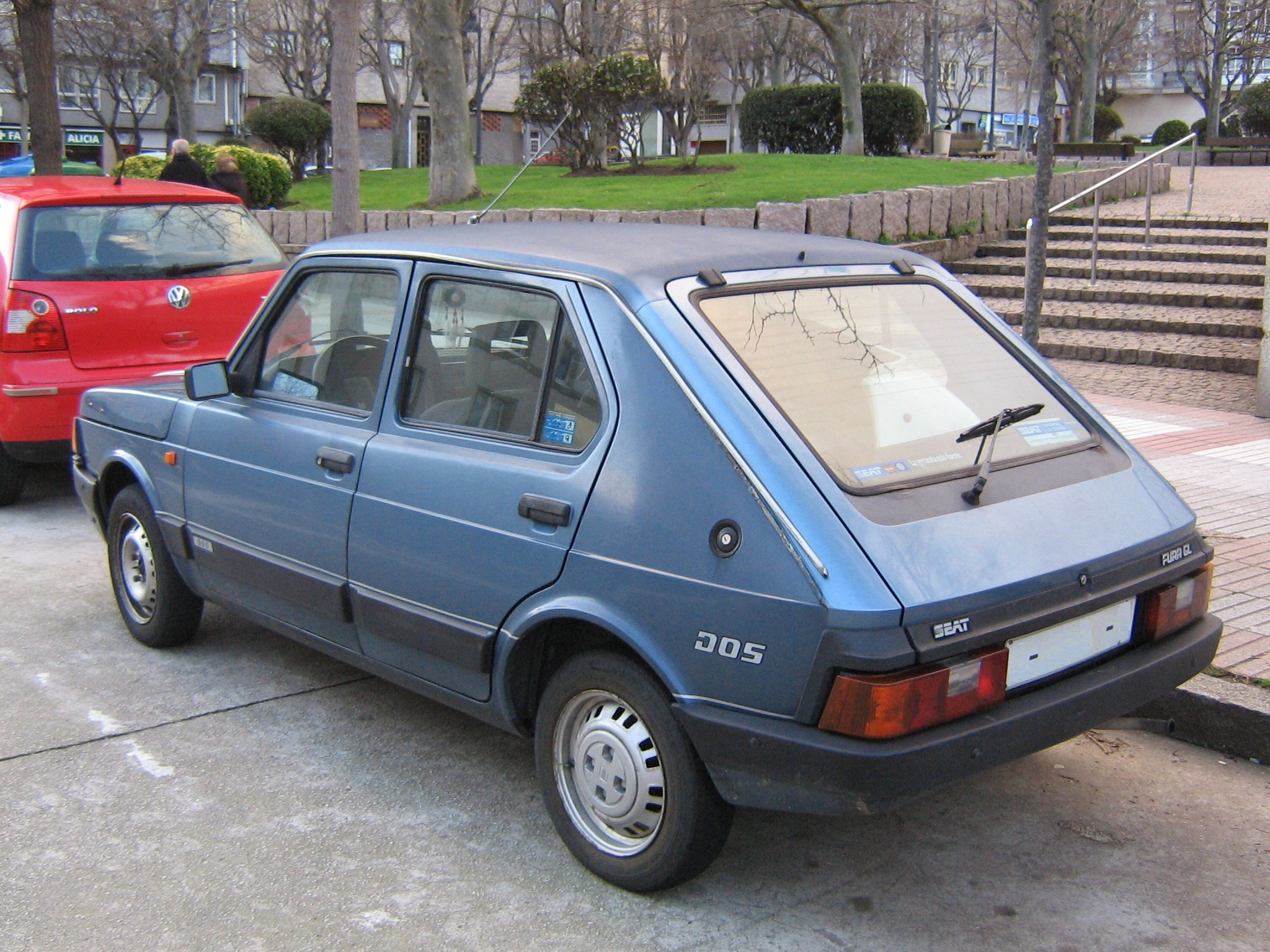 Parte trasera de un SEAT Fura Dos 900 GL.